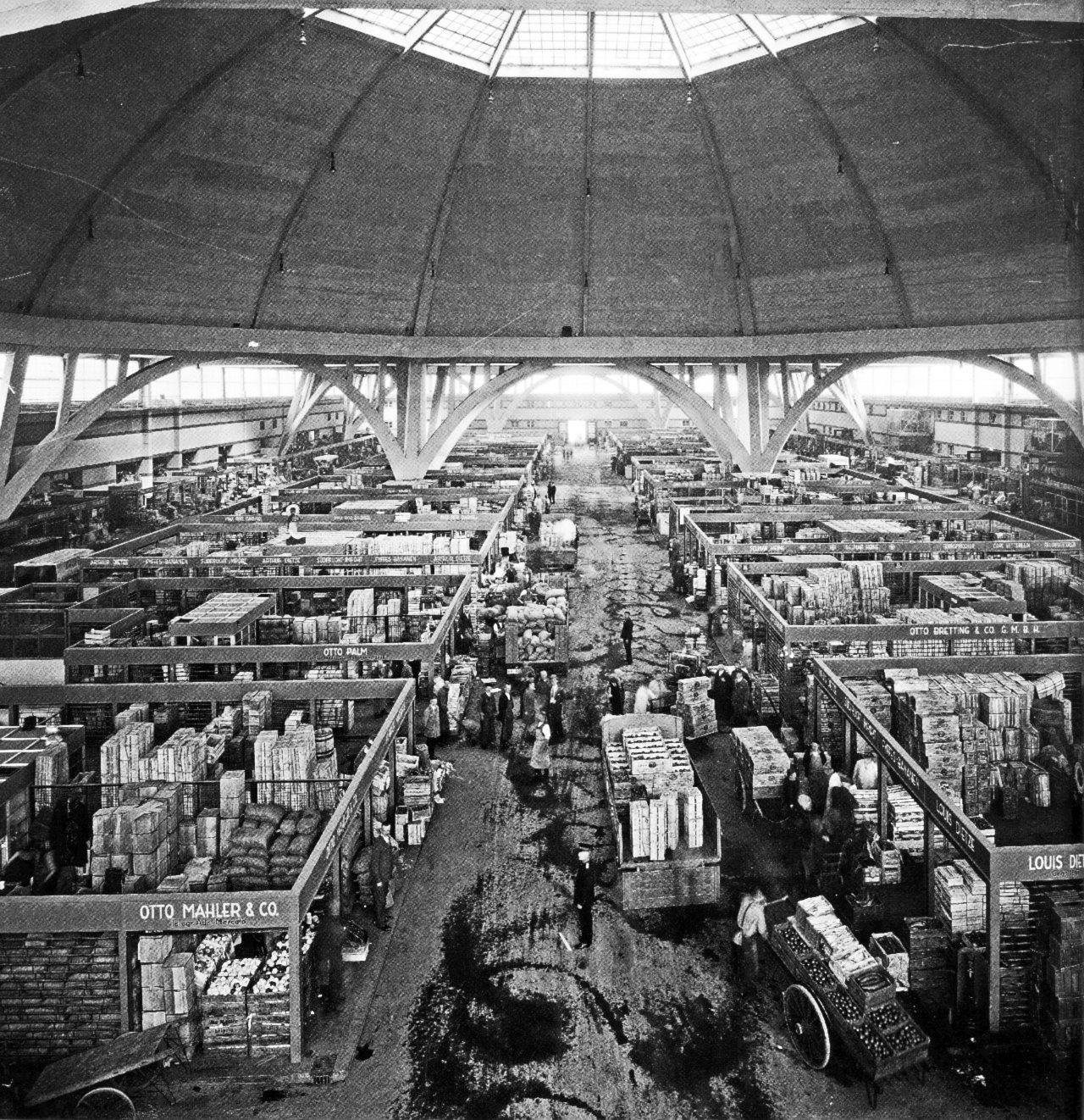 Händler verkaufen in der Großmarkthalle Obst und Gemüse.